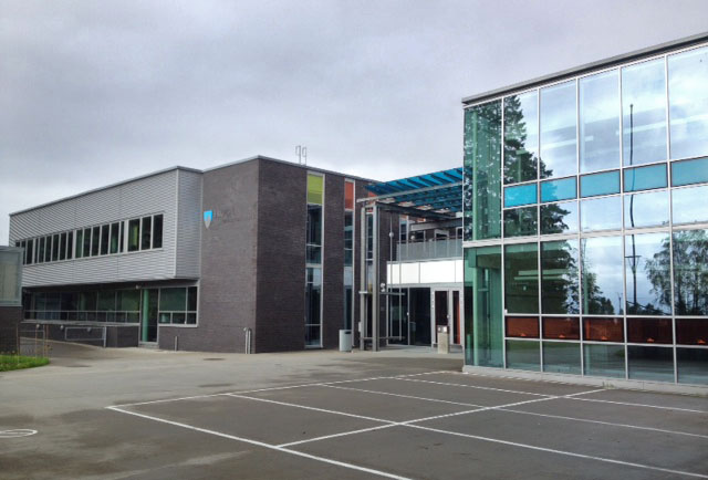 Frogn videregående skole 2015. Inngangspartiet